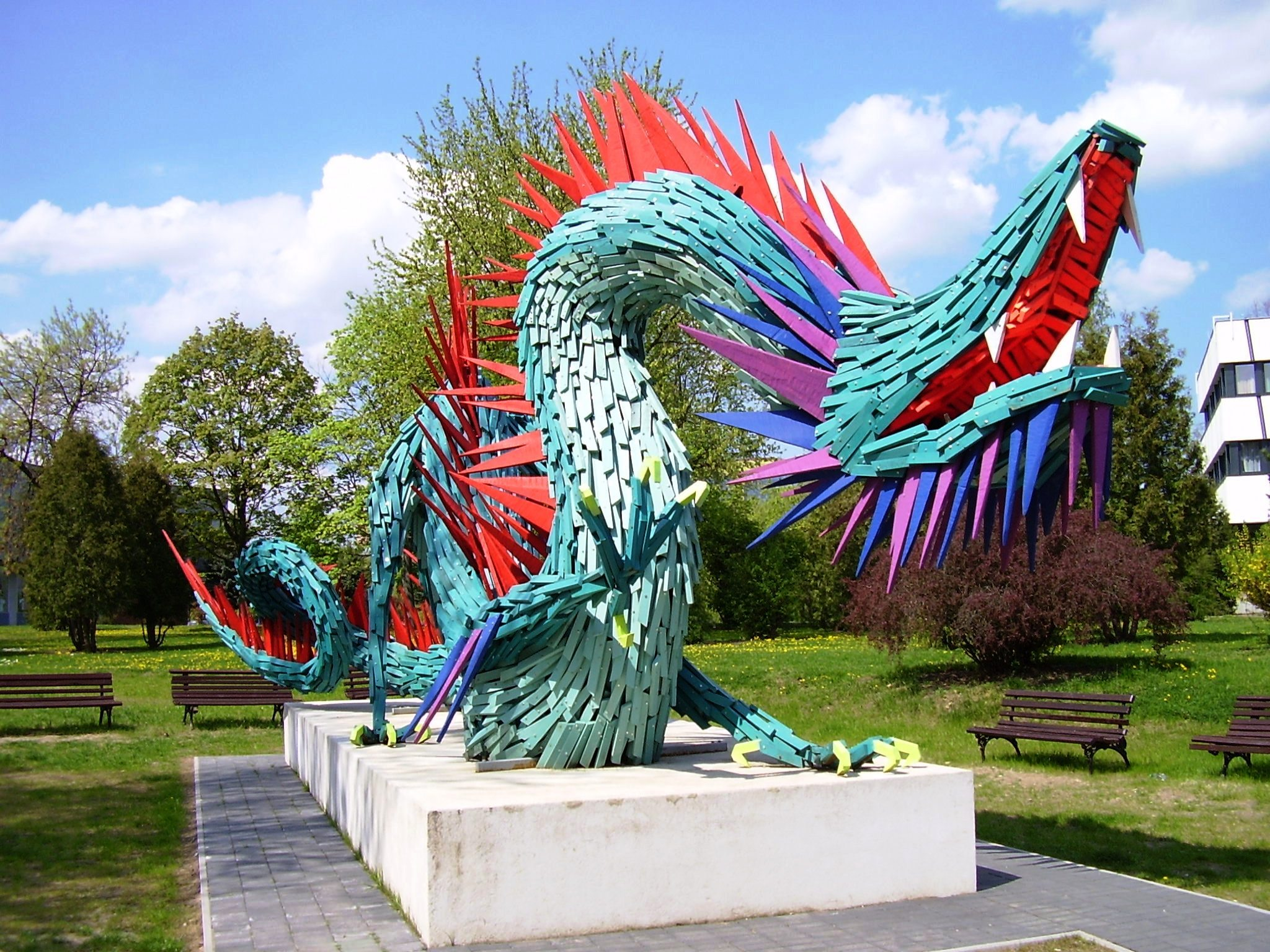 A Kazincbarcikai sárkány (2014) Szőke Gábor Miklós szobra Kazincbarcikán. A művész legújabb kortárs köztéri alkotása, a színpompás kínai sárkány fém vázból készült, rozsdamentes acélcsavarok tartják, 13 méter hosszú és 5 méter magas és több mint 4 tonnát nyom. A szobor a kínai–magyar együttműködés jegyében a városvezetés felkérésére a Wanhua Industrial Group és a BorsodChem Zrt. támogatásával készült el.